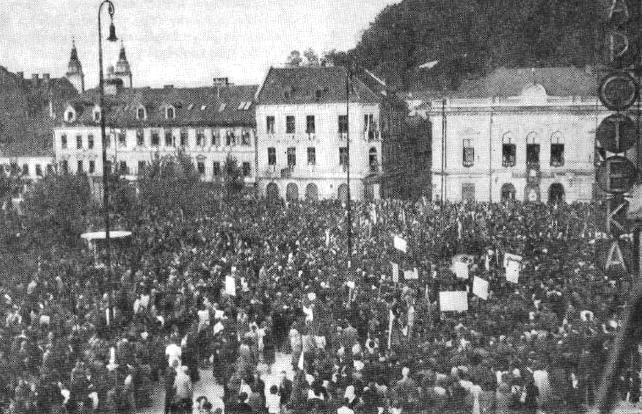 Osvoboditev Ljubljane 9. maja 1945. Sprejem jugoslavanske vojske v Ljubljani.